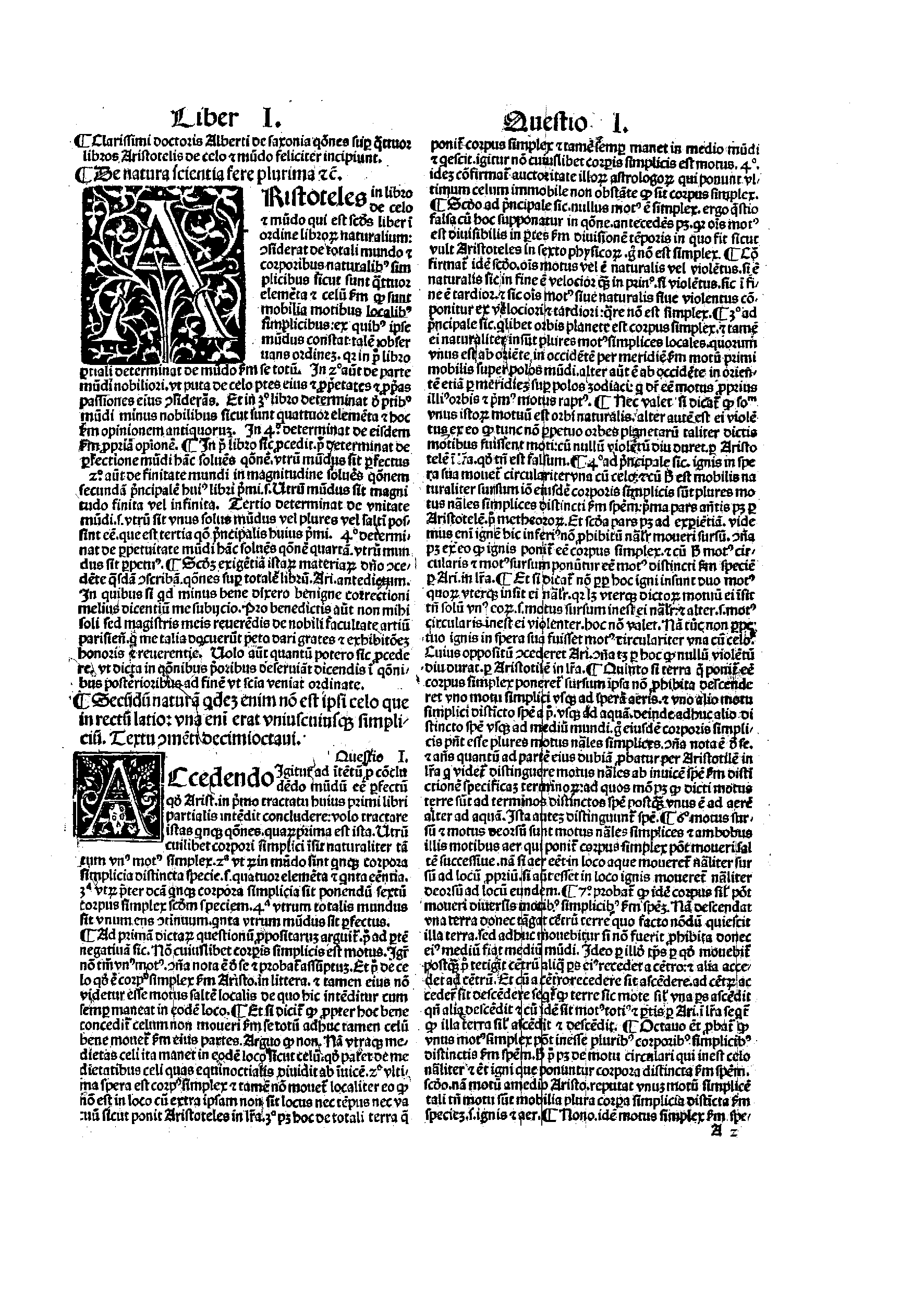 Questiones subtilissime. Alberti de saxonia in libros de celo et mundo. - Impresse a[u]t[em] Venetijs : arte Boneti d[e] locatellis [...] Impensa v[er]o nobilis viri Octauiani scoti, 1492. - [52] c. - L'identità del curatore, Girolamo Suriano, si desume dall'explicit. - ISTC No: ia00347000; GW 796 .